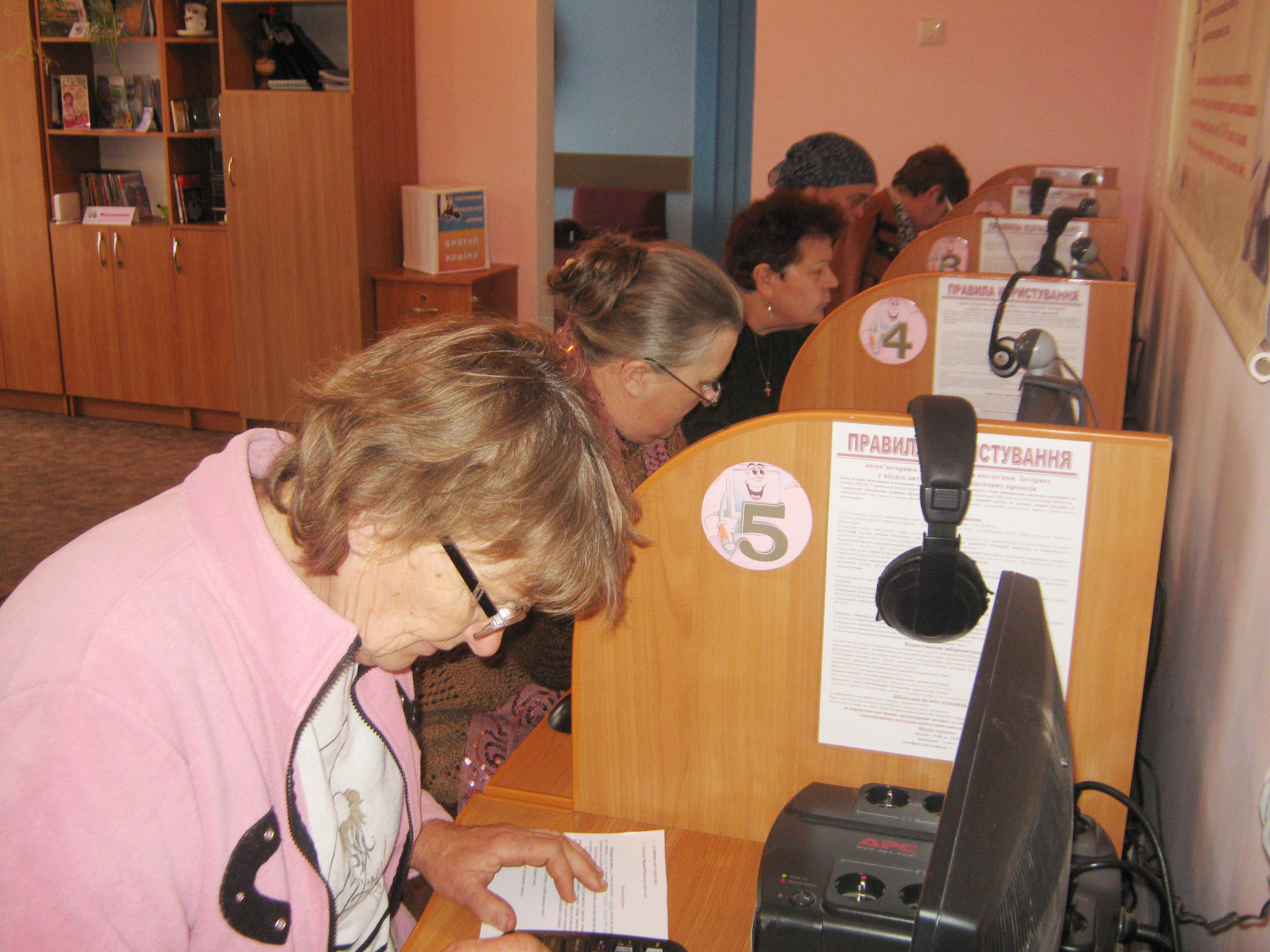 Школа для тих кому за